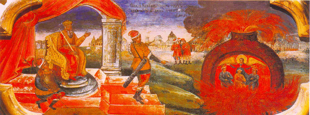 Fiery furnace. Три отрока в пещи огненной. (1776 год, иконстас церкви села Верховье). From Verhovie village's iconostasis